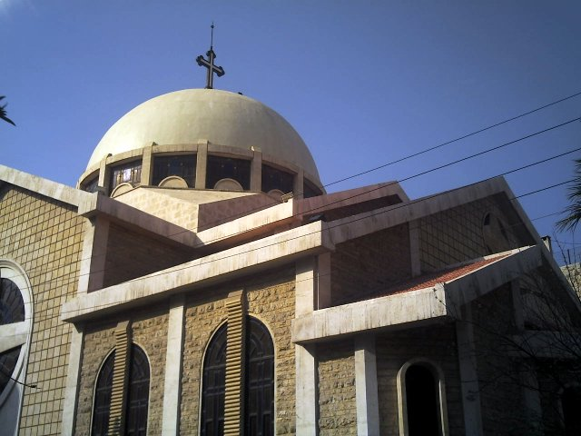 Aleppo, Syria.